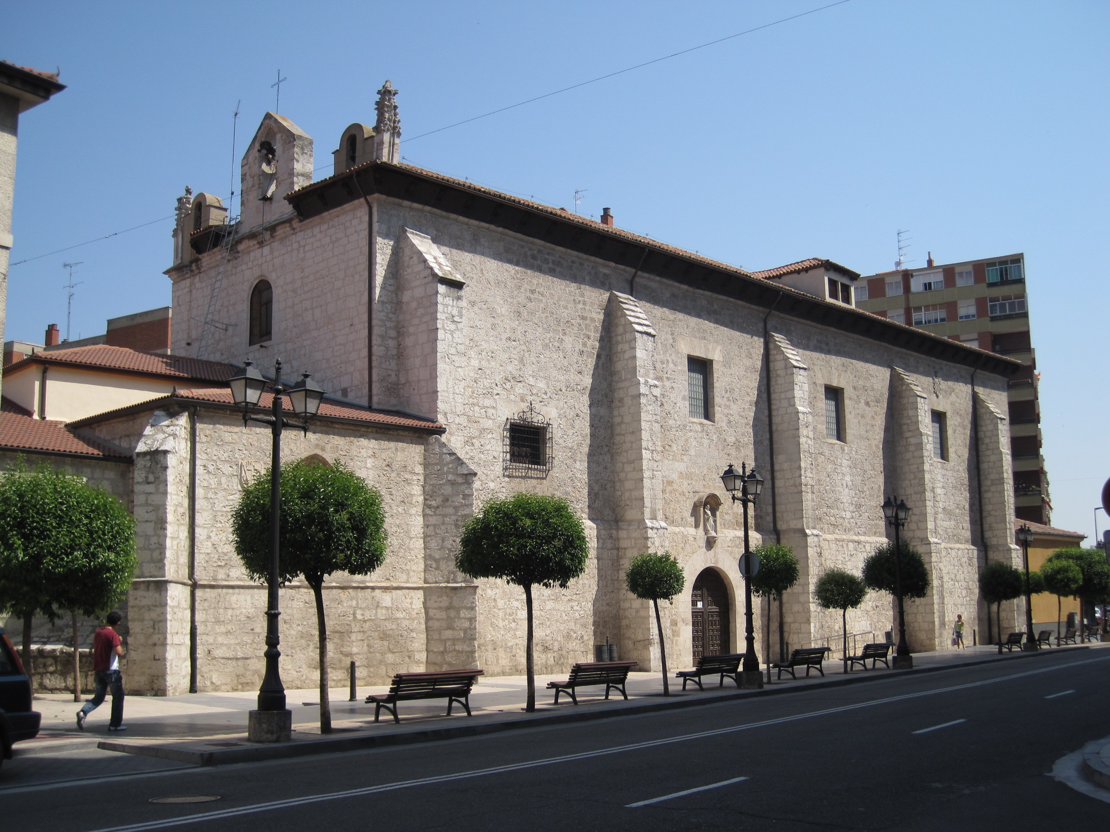 Vista de la iglesia de Santa Clara de Asís, en Valladolid (España).